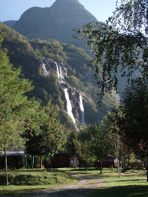 Foto delle cascate dell'Acquafraggia